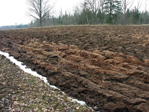 Suartas laukas Foto: Algirdas, 2006 m. balandžio 8 d.